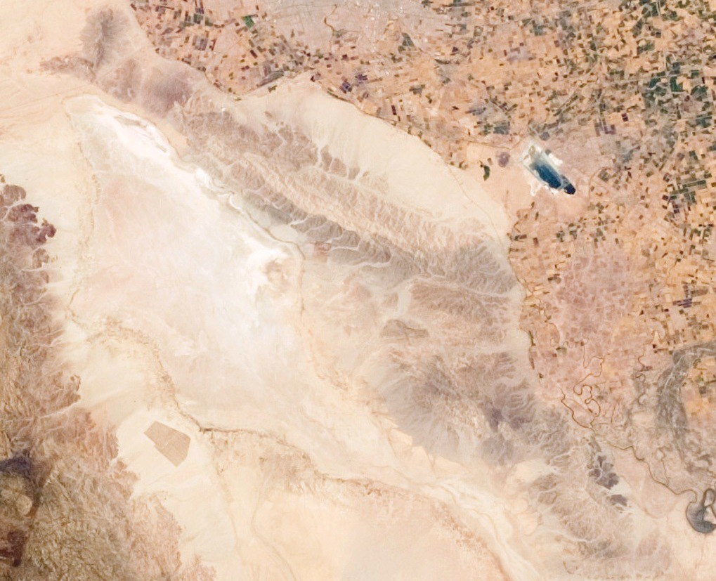 Es el acercamiento de una imagen tomada desde la estación espacial internacional. Aqui puede apreciarse la sierra Cucapá en toda su extensión